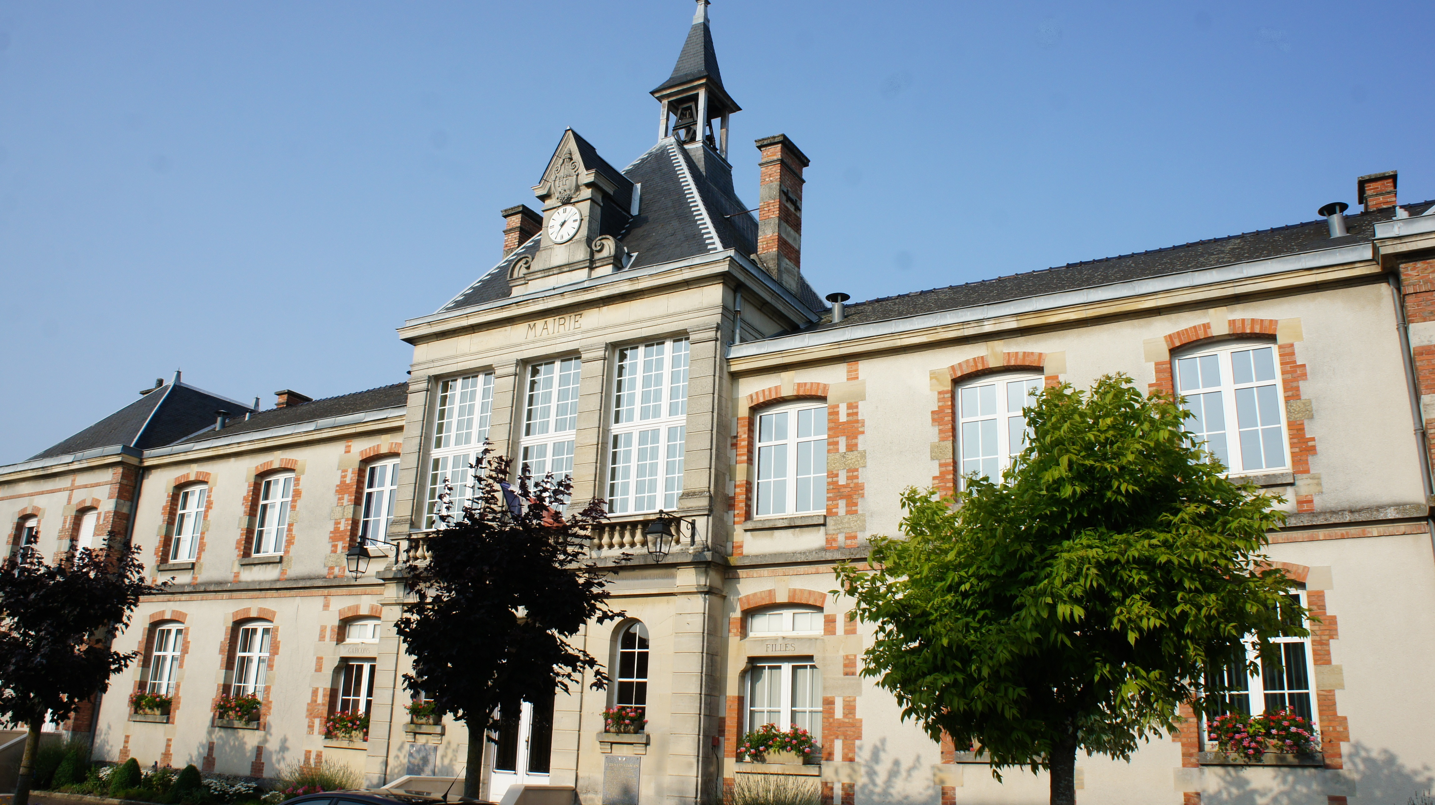 vue de la Vierge devant la porte nord.